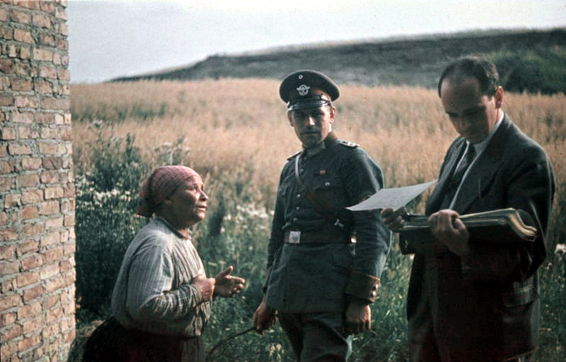 Dr. Robert Ritter mit alter Frau und Polizist Dr. Robert Ritter mit Aktenmappe und einer alten Frau (Sinti/Roma?), und Inspektor (?) der Ordnungspolizei Abgebildete Personen: Ritter, Robert Dr.: Rassenforscher, Leiter des Reichsgesundheitsamtes, Deutschland ( GND 119015501 )